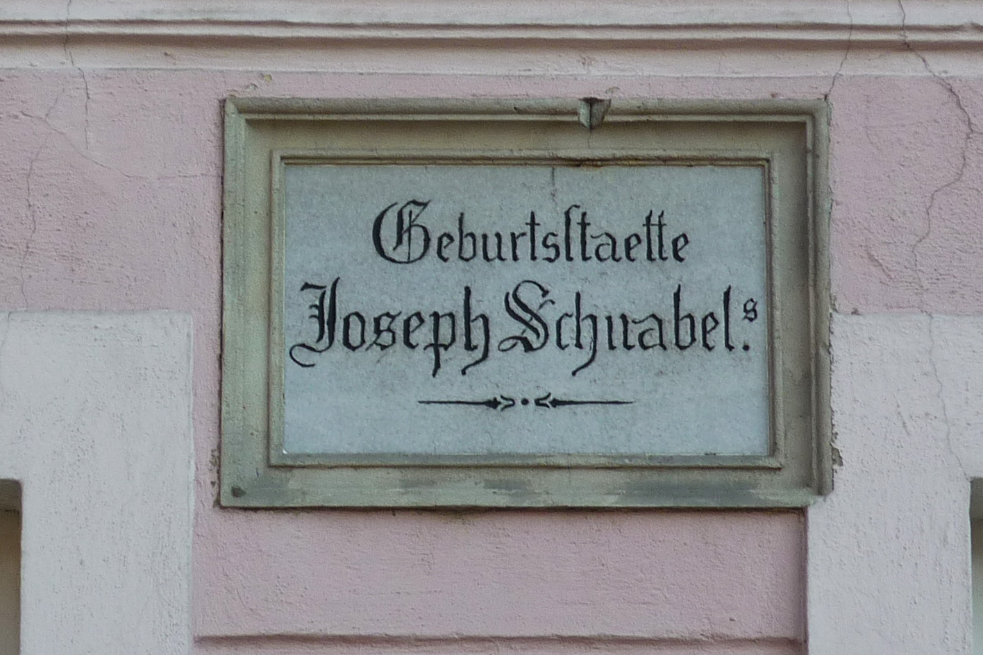 Tafel am Geburtshaus des Komponisten Joseph Ignaz Schnabel in Naumburg am Queis (Nowogrodziec) in Niederschlesien